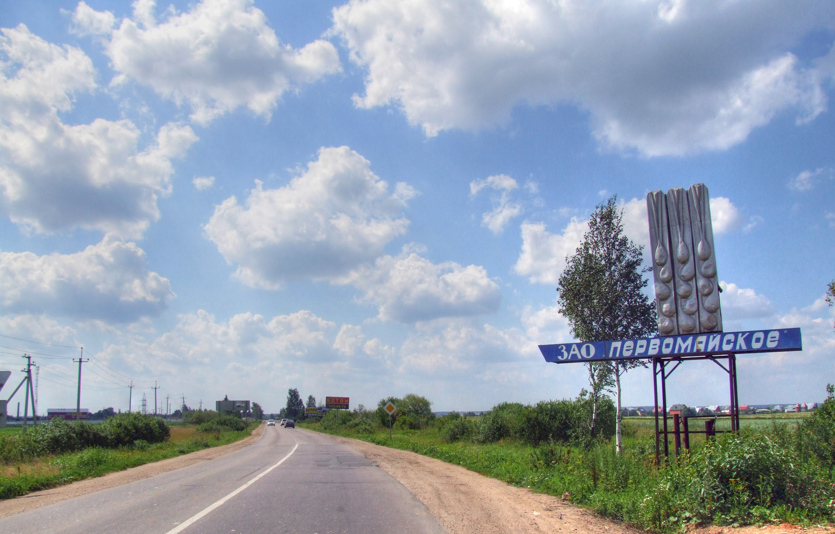 На подъезде к поселению Первомайское